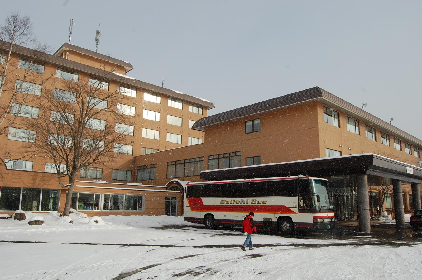 クラブメッドサホロ